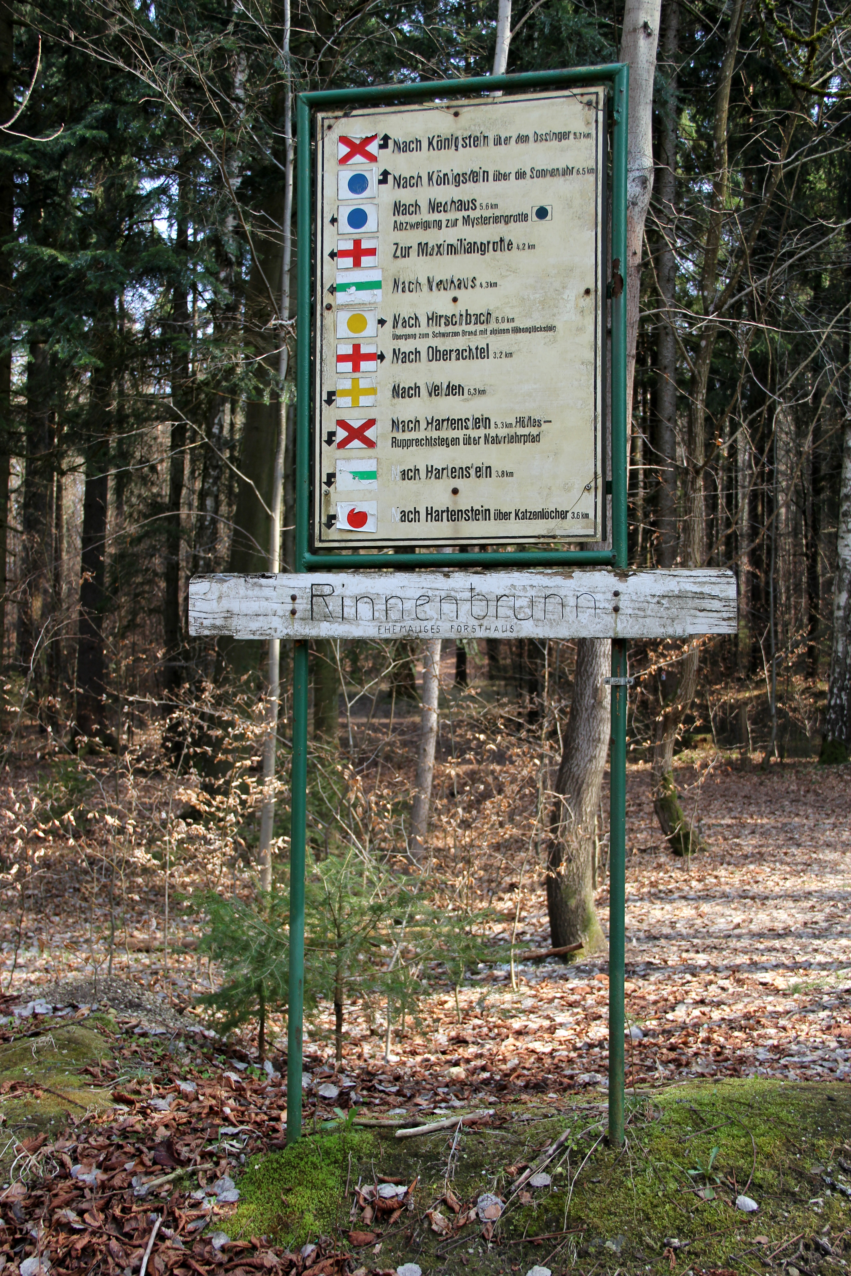 Bismarkgrotte bei Rinnenbrunn, Wanderschild